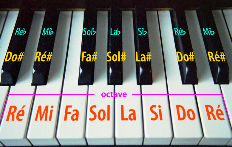 Octave, nom des notes, touches blanches et noire d'un clavier de piano Octave, notes names, black and white keys of a piano keyboard Valable aussi pour orgue, clavecin et autres instruments à clavier.